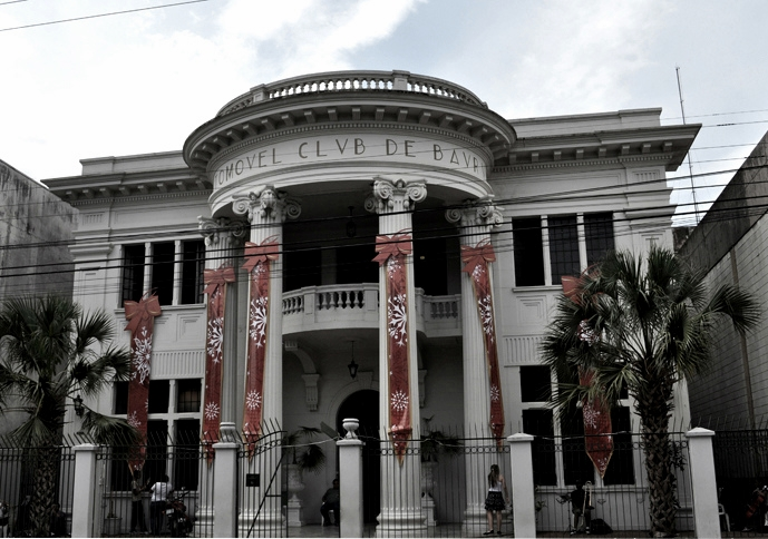 Automóvel Clube de Bauru, São Paulo, Brasil.